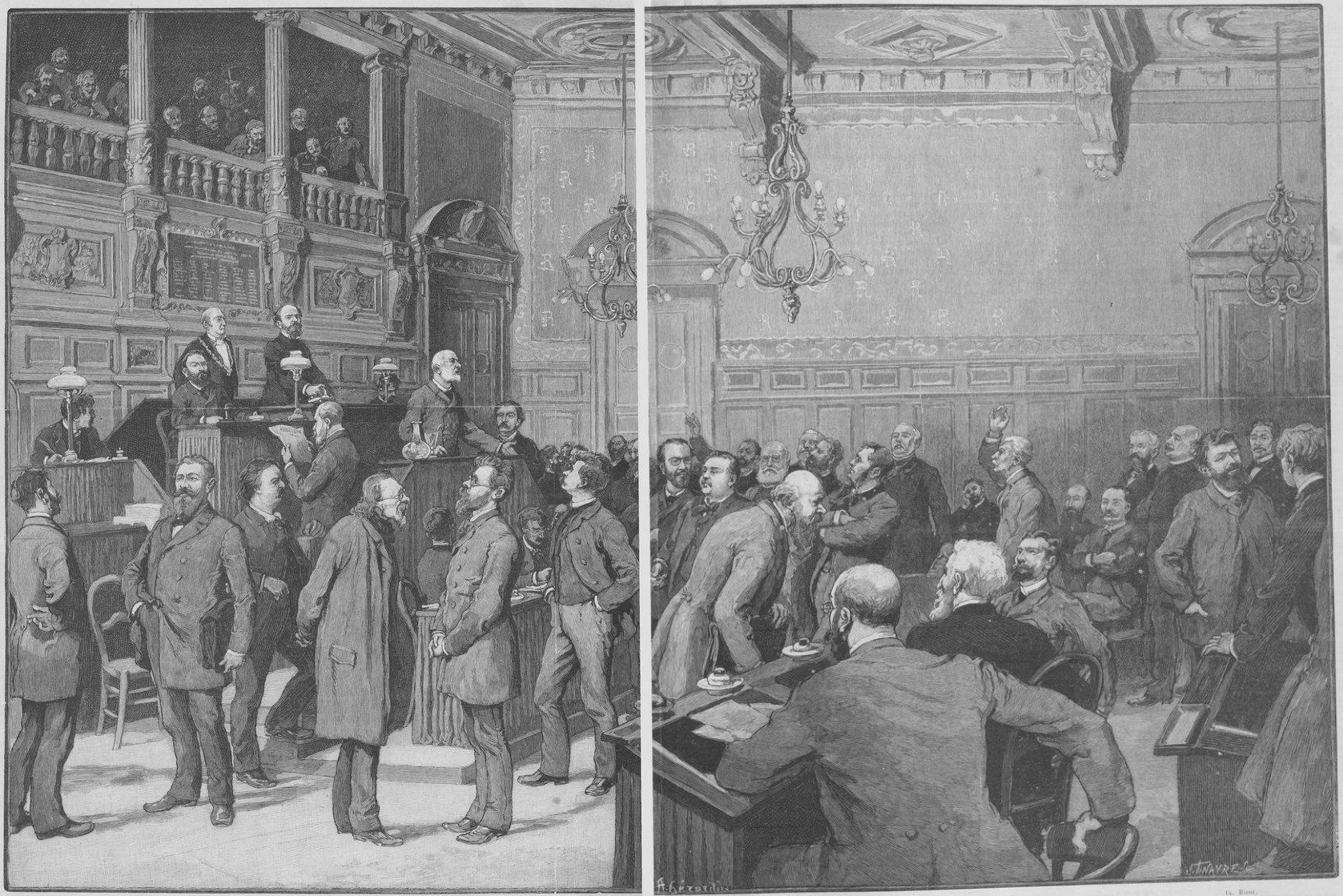 "Paris. - Une séance du conseil municipal. - Dessin de M. Gérardin. - Gravure de M. Julien Tinayre".